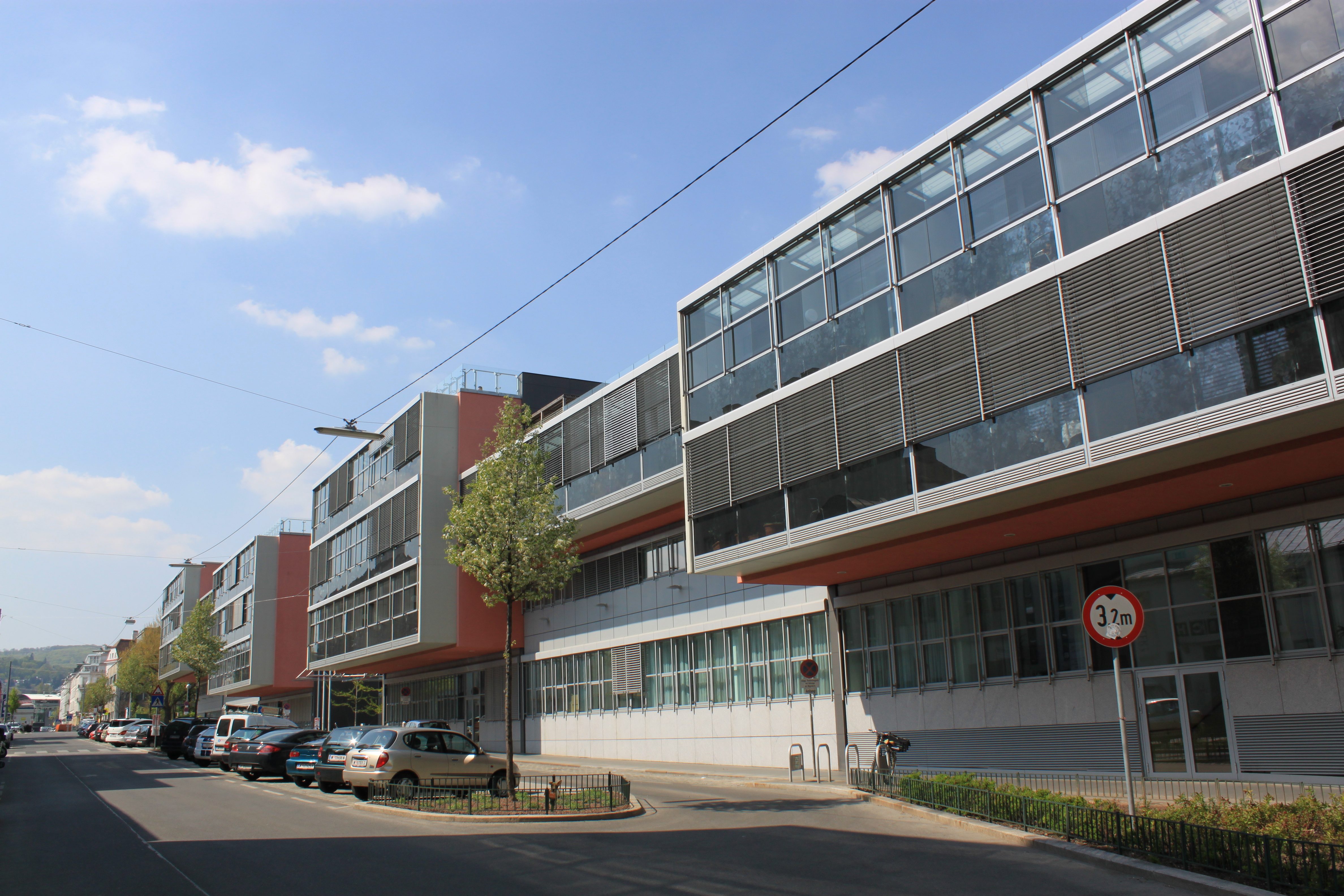 Haus der Barmherzigkeit, Seeböckgasse 30a, Wien-Ottakring